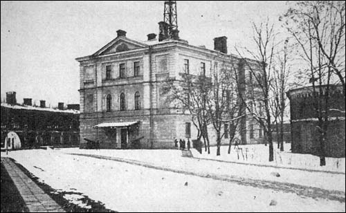 Белы палац